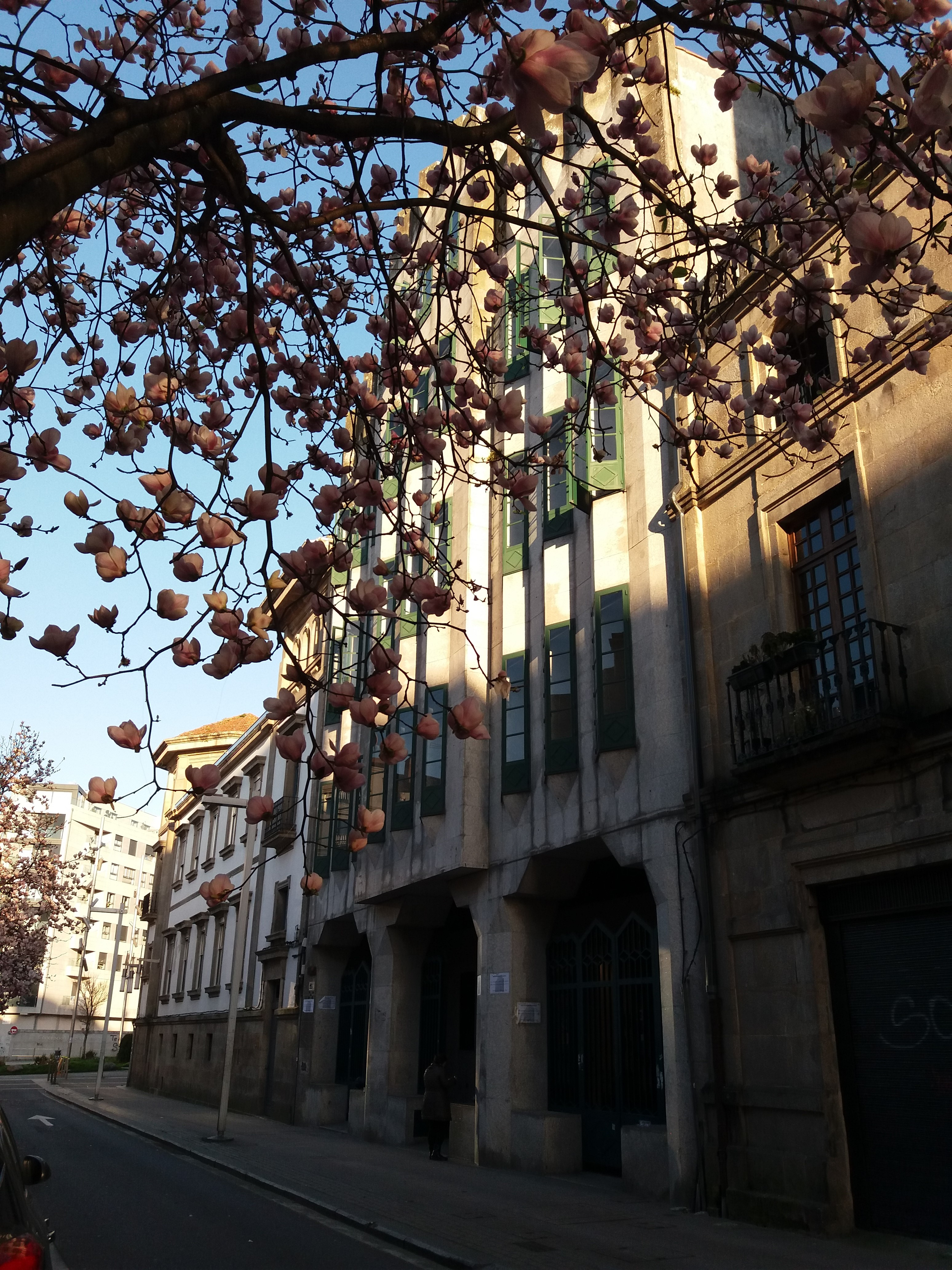 Fachada Biblioteca Pública de Pontevedra